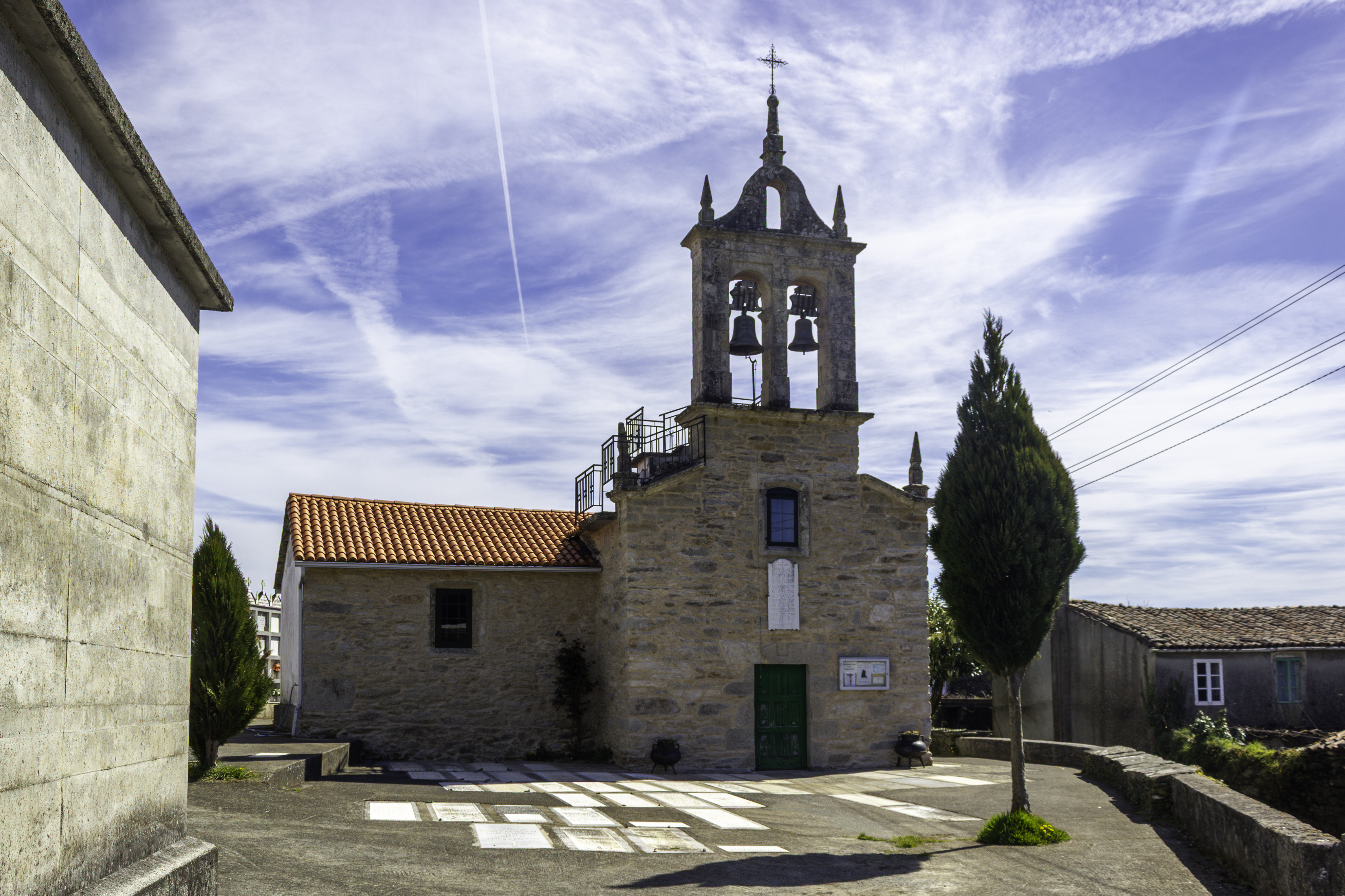 Igrexa de Santo Estevo de Pantiñobre, no concello de Arzúa.